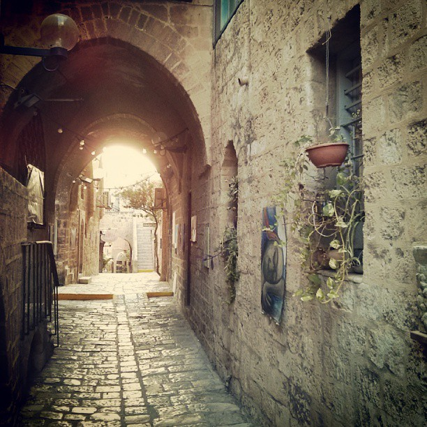 Old Jaffa, 13 Mazal Dagim Israel